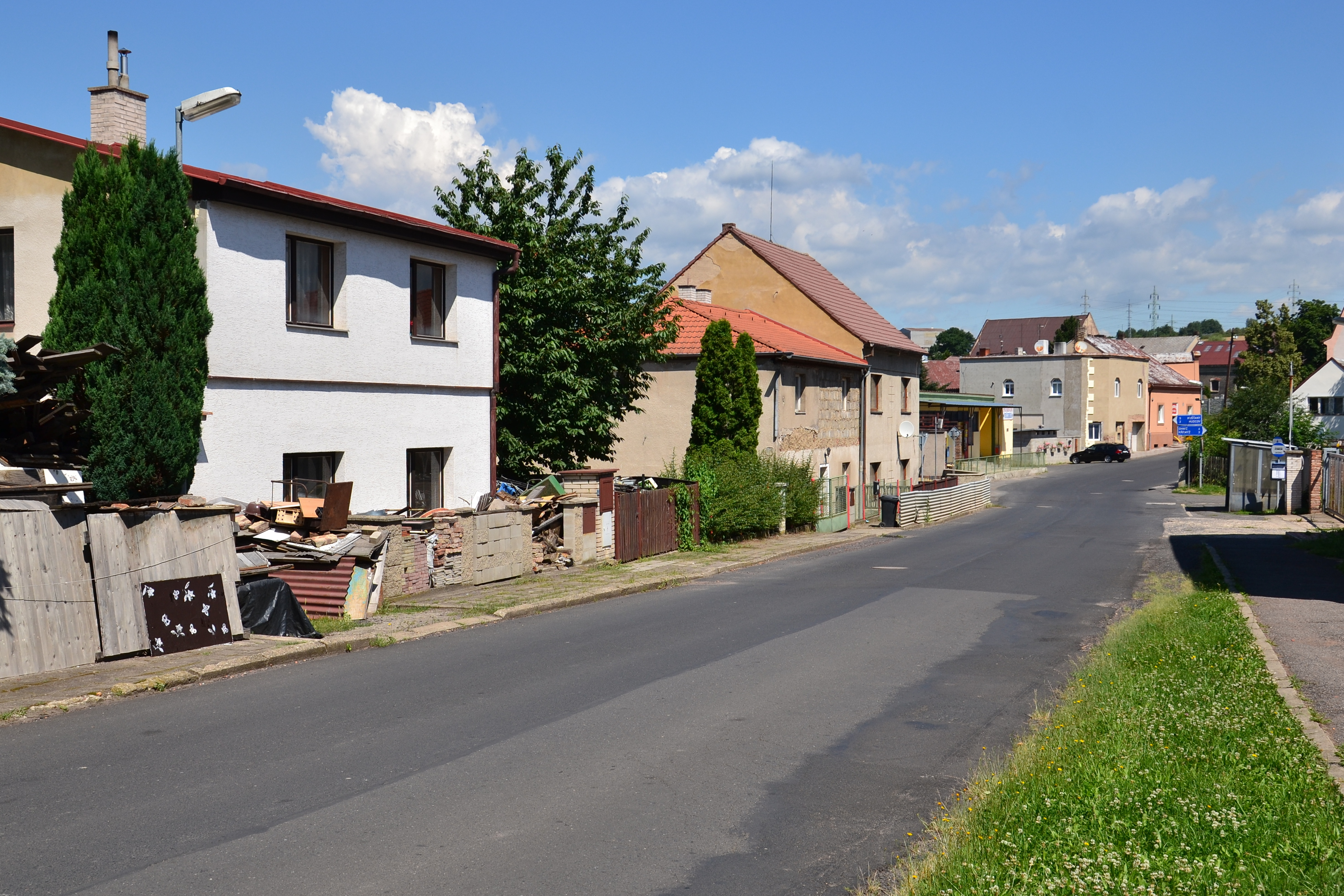 Ulice směrem k Zabrušanům